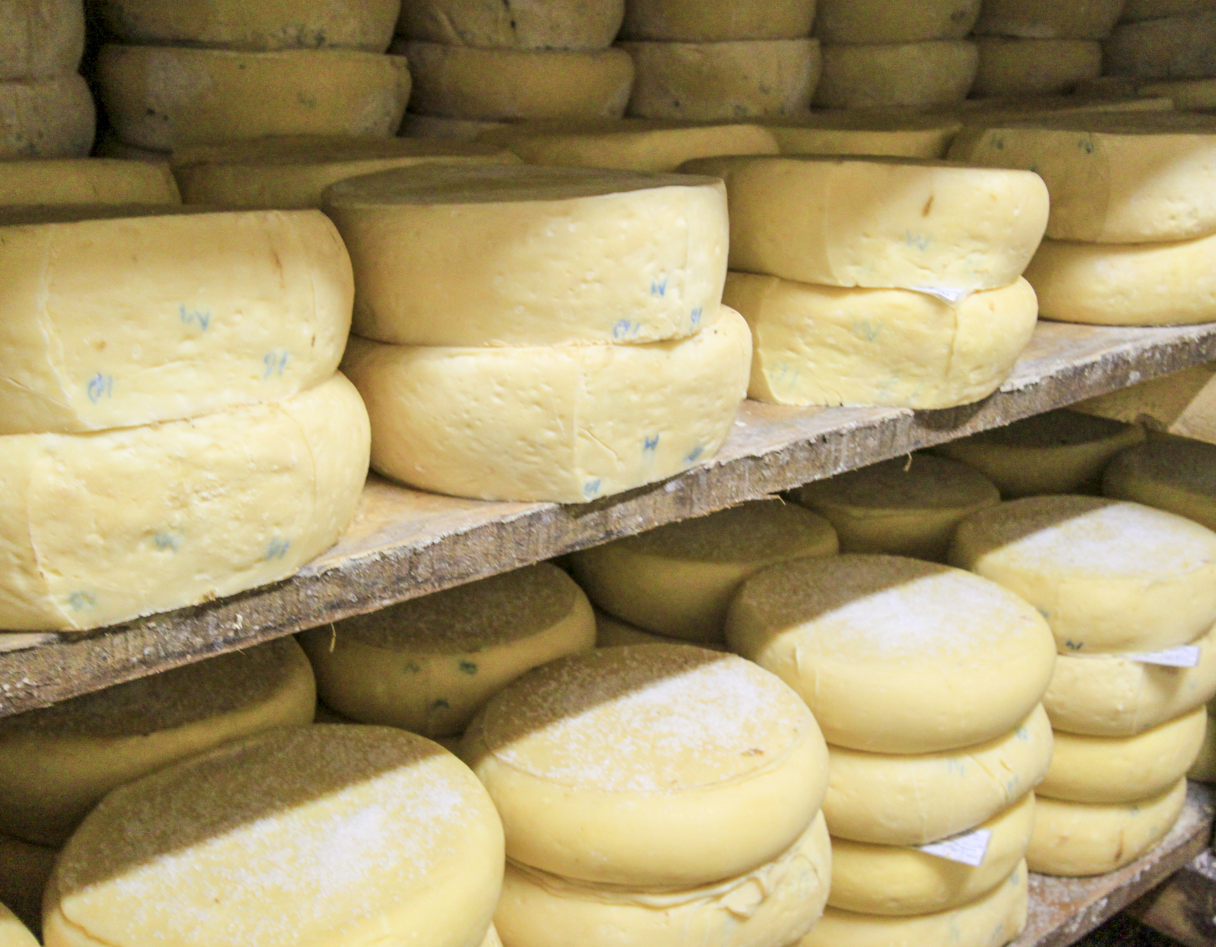 Пиротски качкаваљ